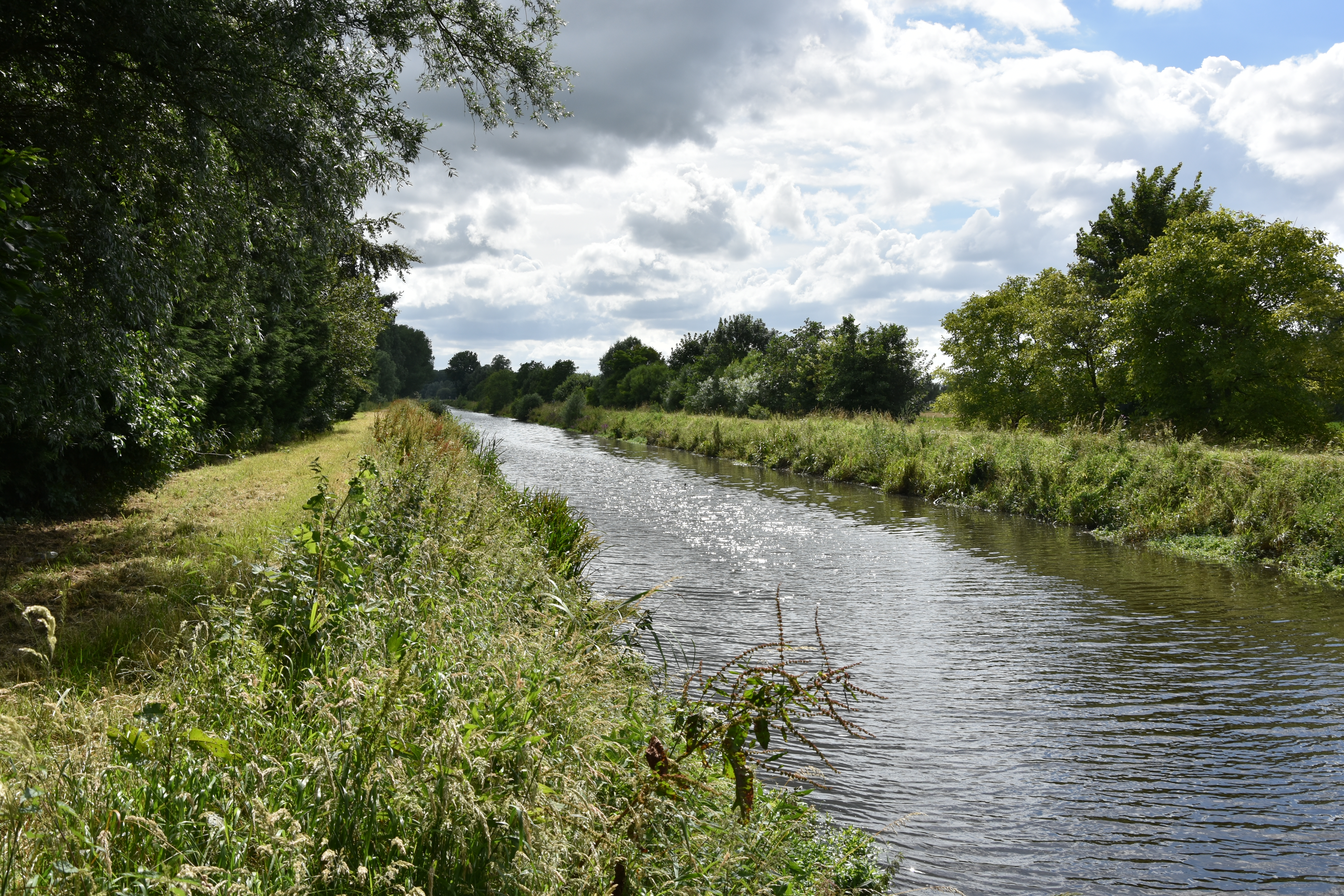 Fondatie van Boudelo links van de Stekense Vaart - Sinaai, Oost-Vlaanderen, België